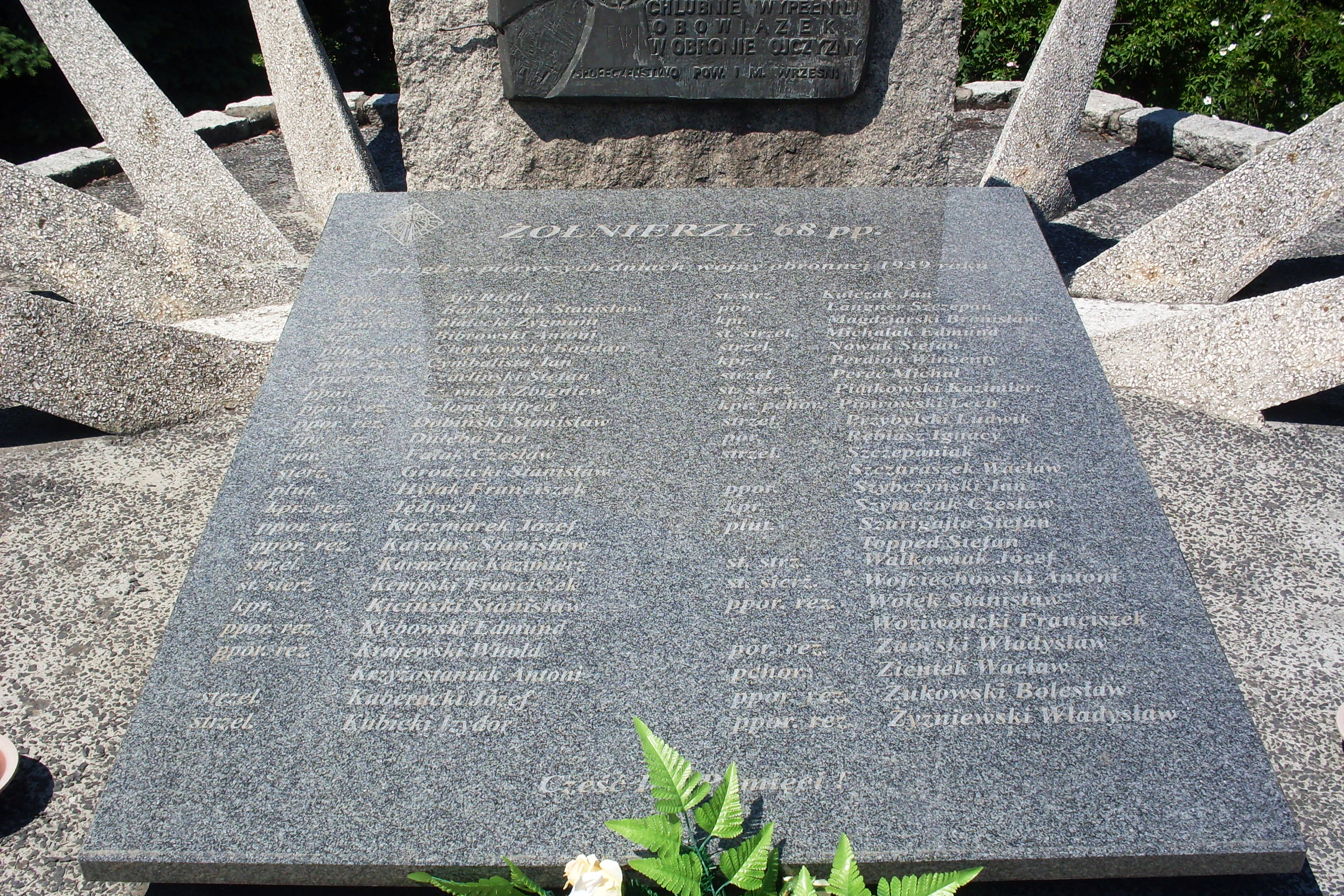 Tablica na pomniku 68 Pułku Piechoty we Wrześni